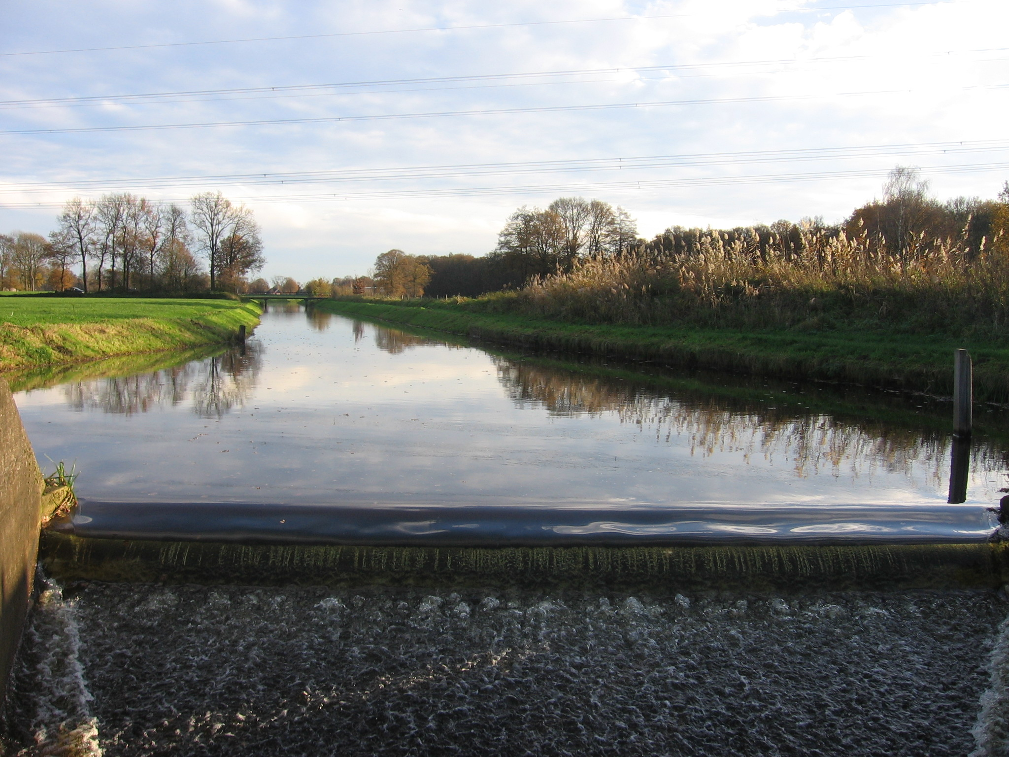 Hagmolenbeek, zelf gefotografeerd